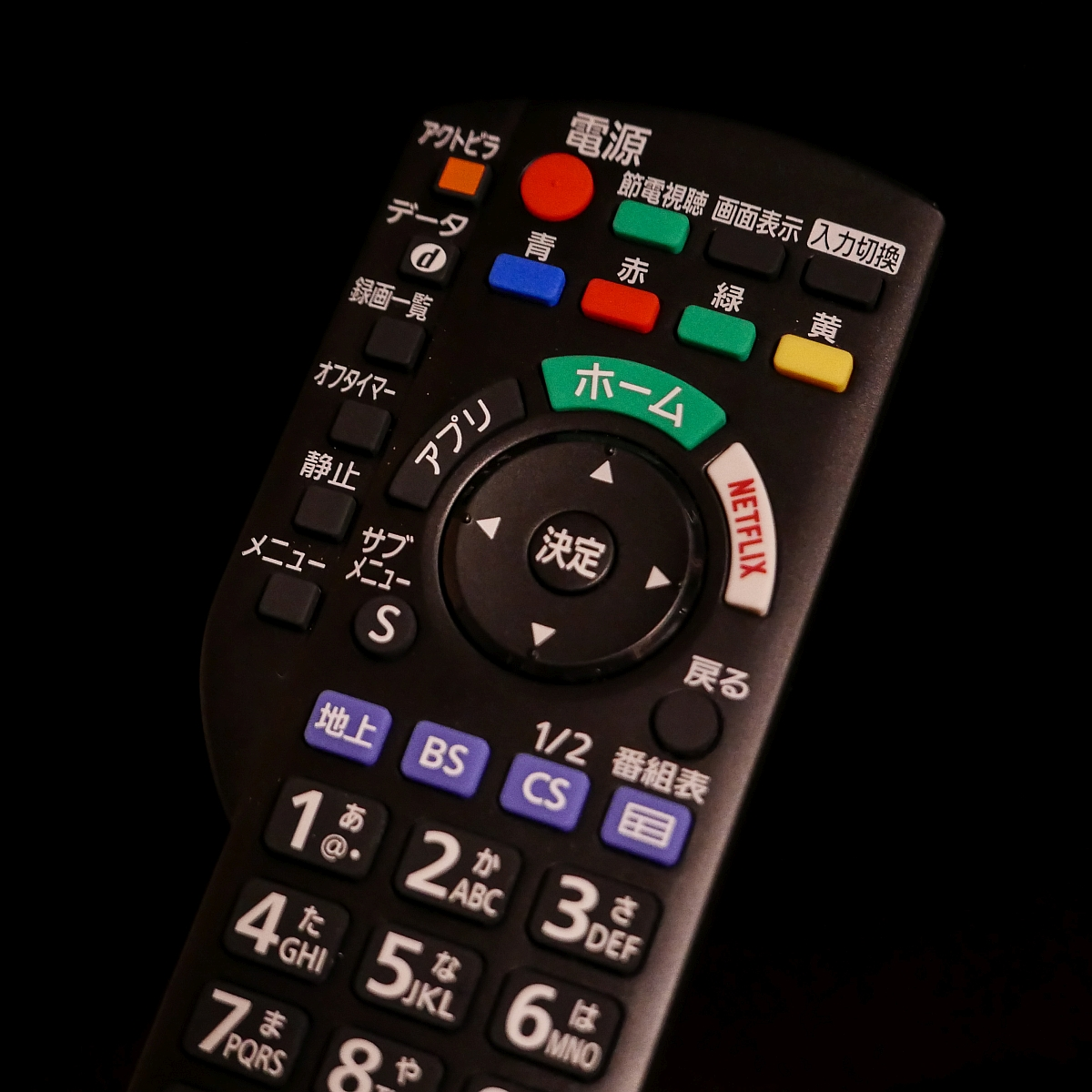 ネットフリックスに対応した、パナソニックビエラCX800シリーズ用リモコン